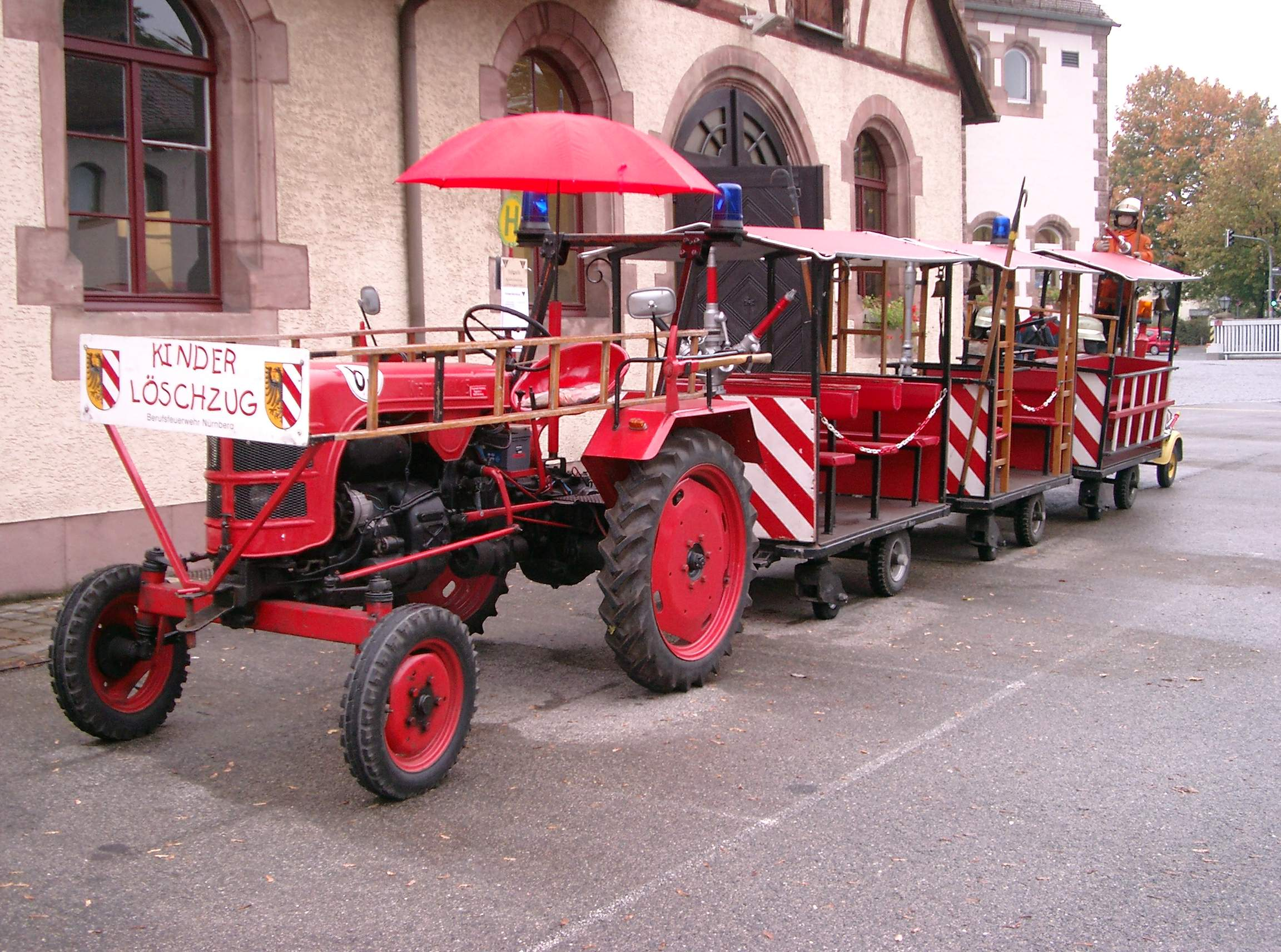 Kinderlöschzug der Berufsfeuerwehr Nürnberg